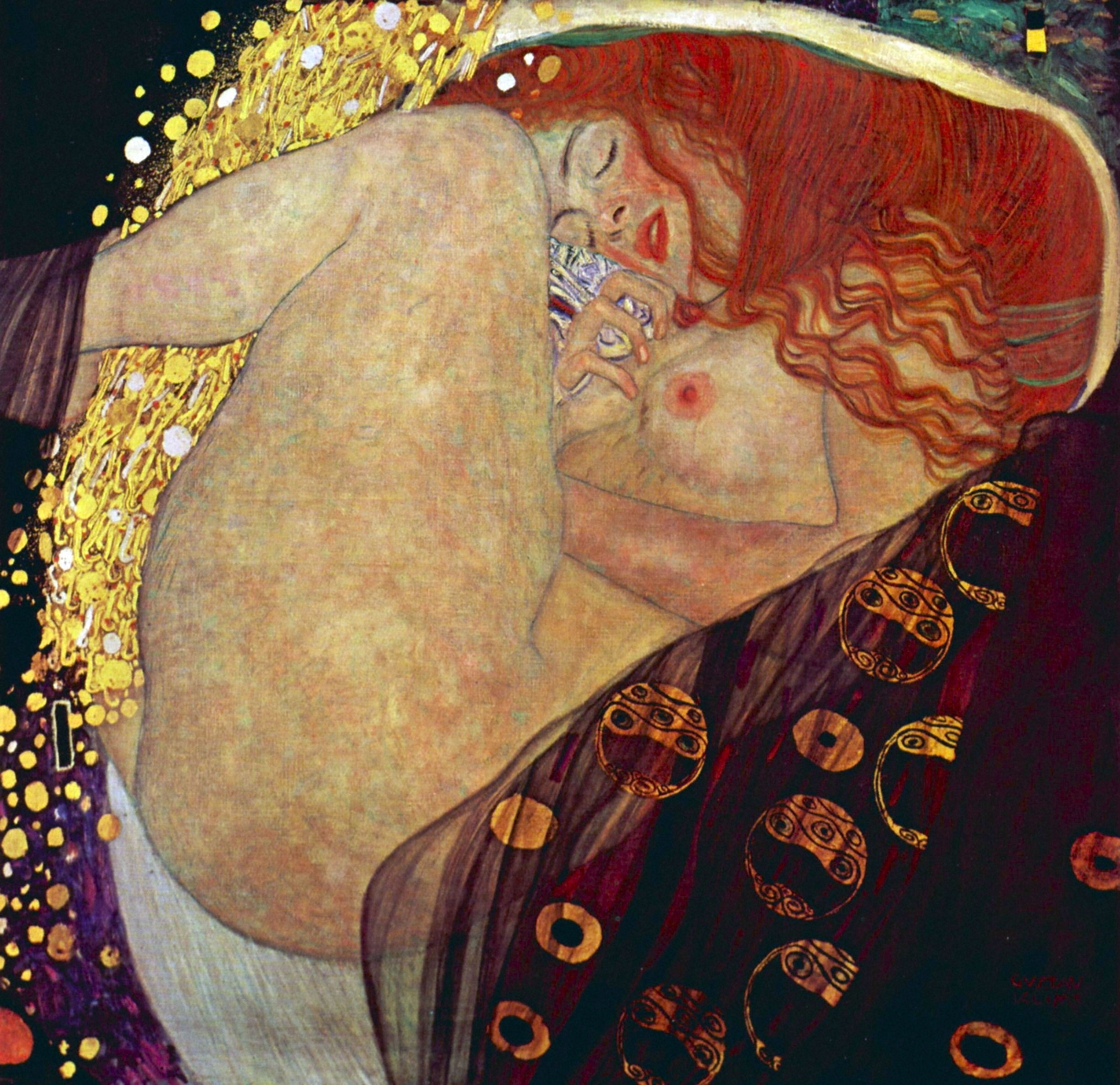 Danae